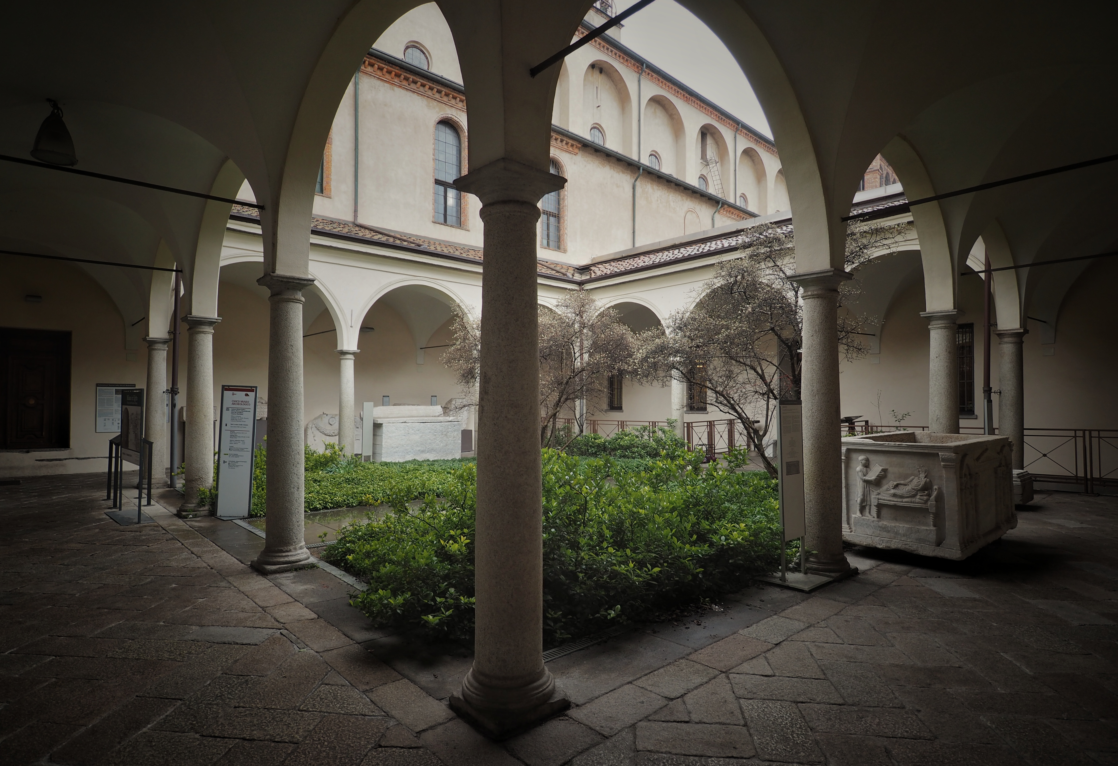 Milano, Italia